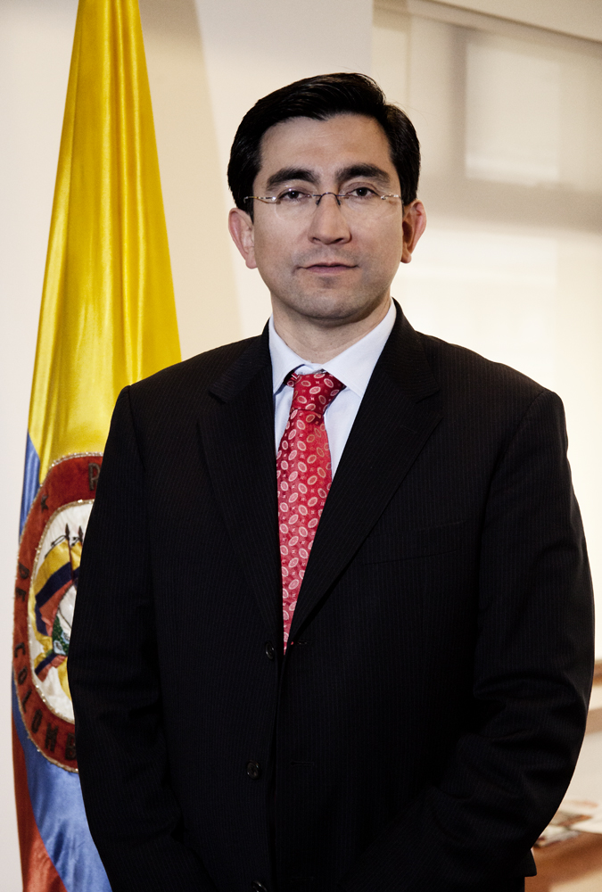 Ministro tic Diego Molano Vega